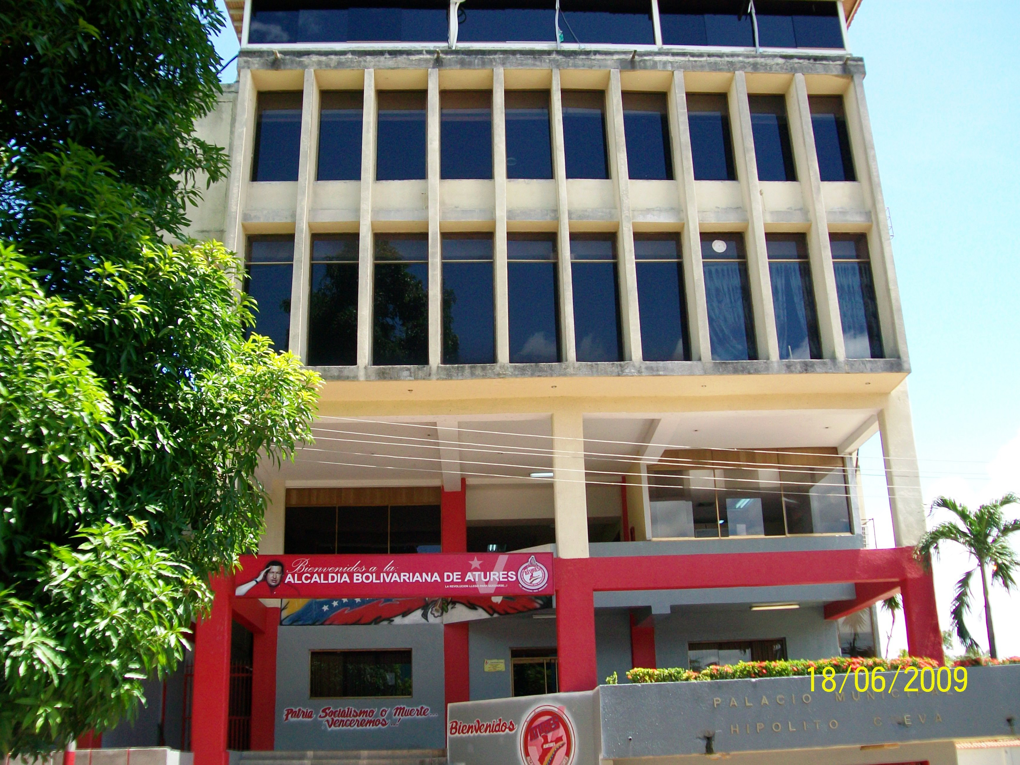 el edificio de la alcaldia de puerto ayacucho y del municipio atures ubicado en la inmediaciones de la plaza bolivar de puerto ayacucho,venezuela